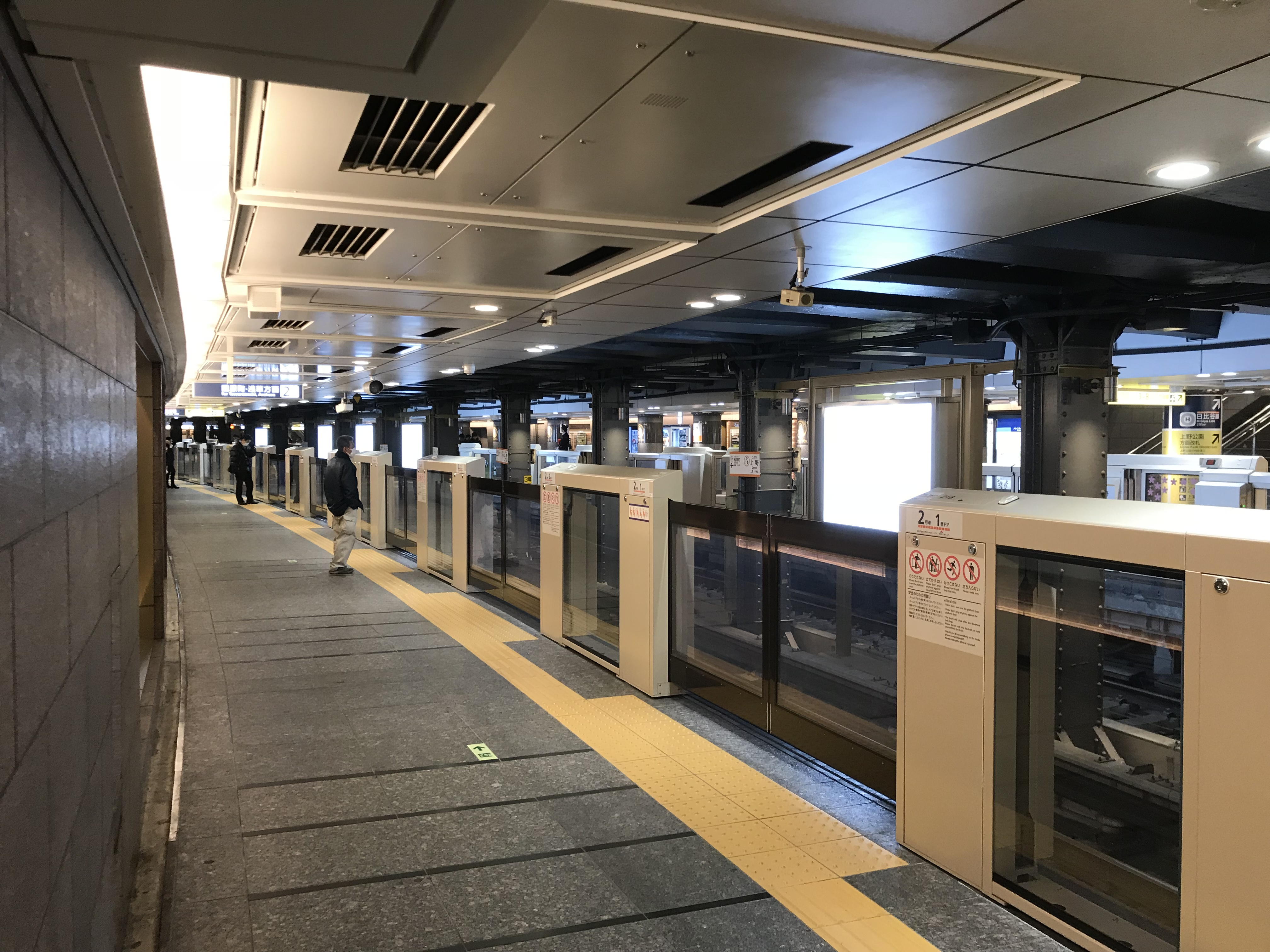 東京メトロ上野駅銀座線2番線